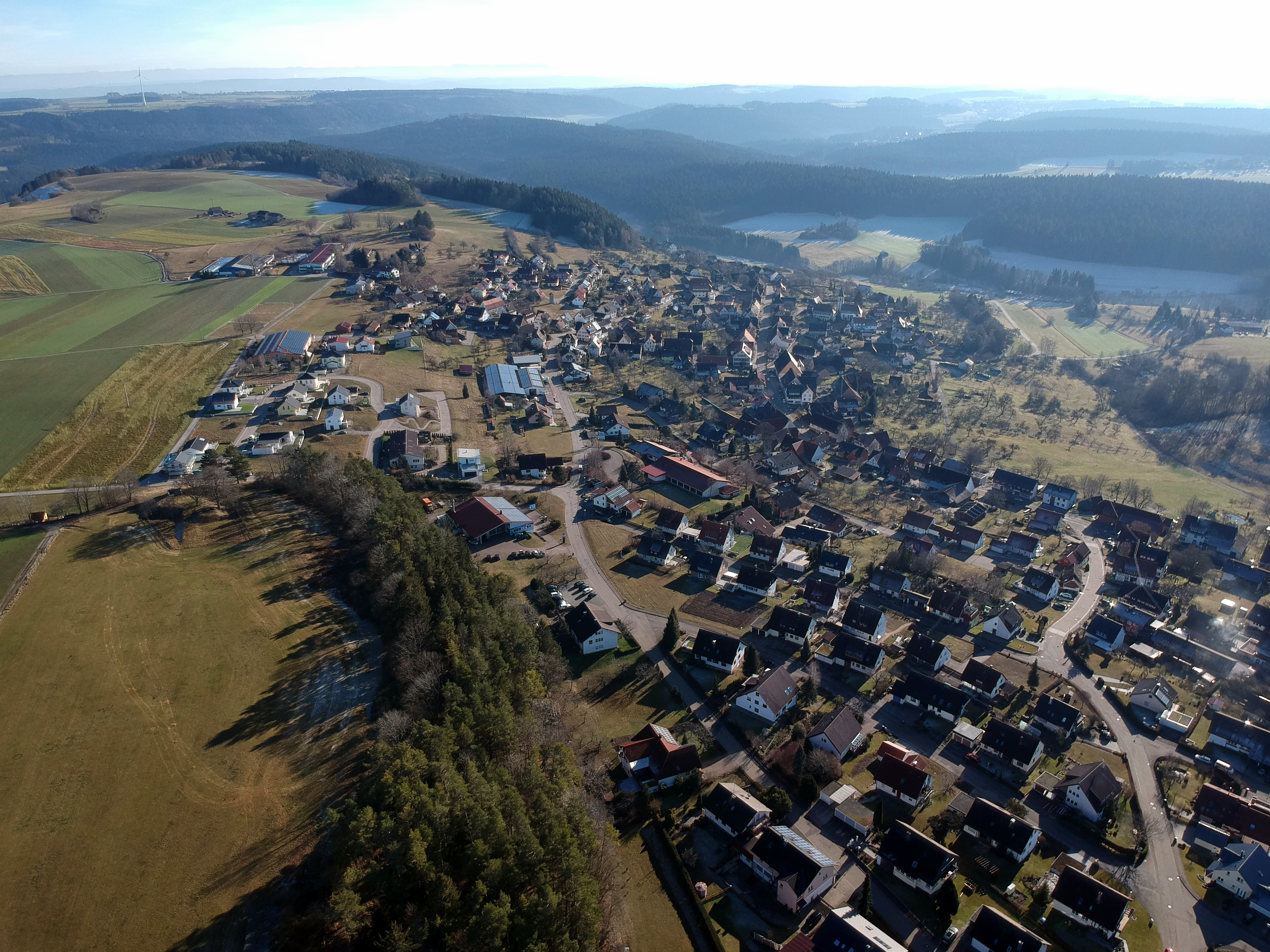 Wittendorf (Loßburg) Luftbild in Richtung Süden, Ortskern Mitte hinten Aufnahme von Ende 2018